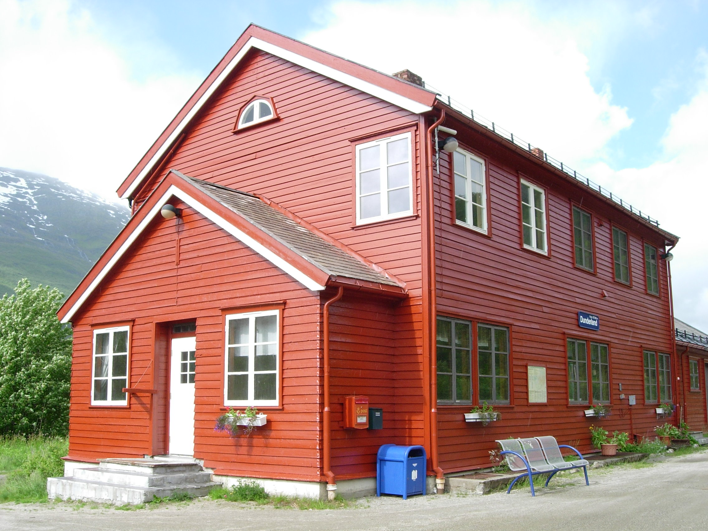 Dunderland stasjon on Nordlandsbanen, Norway